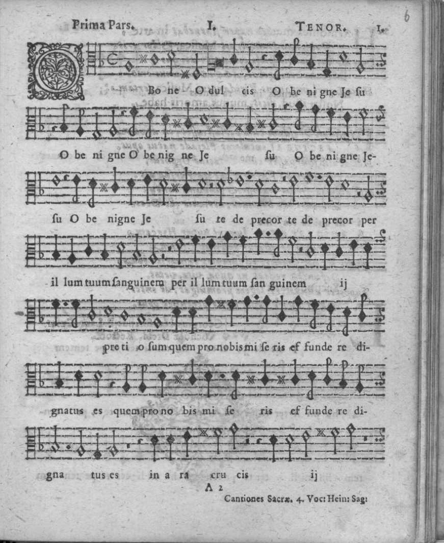 Motet "O Dulcis" des Cantiones Sacrae, ténor, édition originale